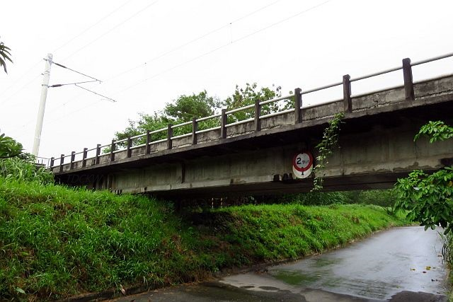 台鐵台東線關山～瑞和間跨越加典溪的「奸仔典溪橋」(堤防外局部照)20181010